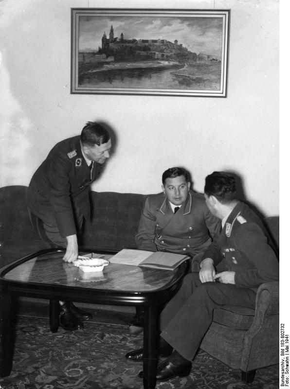 Krakau, Besprechung mit Dr. Joseph Bühler Generalgouverneur Dr. Hans Frank und seine Mitarbeiter. Ein Bildbericht vom Sitz der Regierung des Generalgouvernements in Krakau. U.B.z. Besprechnung im Büro des Staatssekretärs Dr. Josef Bühler (Mitte), links: Oberlandesforstmeister Dr. Eisfeld, rechts: Unterstaatssekretär Kundt. Fot. Schwahn 12.5.41 [Herausgabedatum] Abgebildete Personen: Bühler, Joseph Dr.: Staatssekretär des Generalgouvernements in Krakau, Deutschland Eisfeld, Dr.: Oberlandesforstmeister, Deutschland